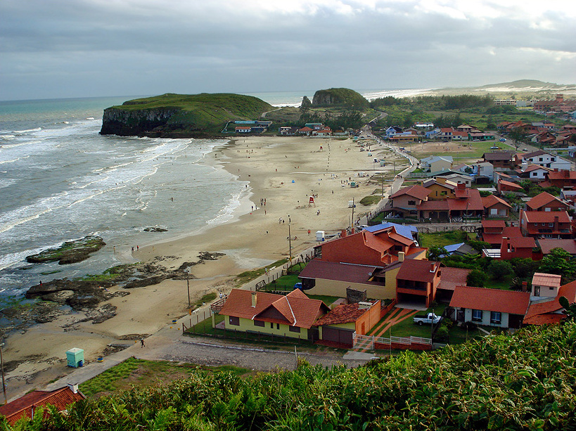 Praia da Cal